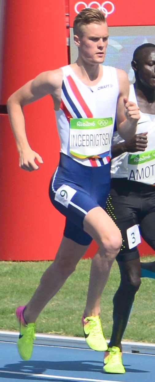 Filip Ingebrigtsen dans sa série du 1500m des JO de Rio